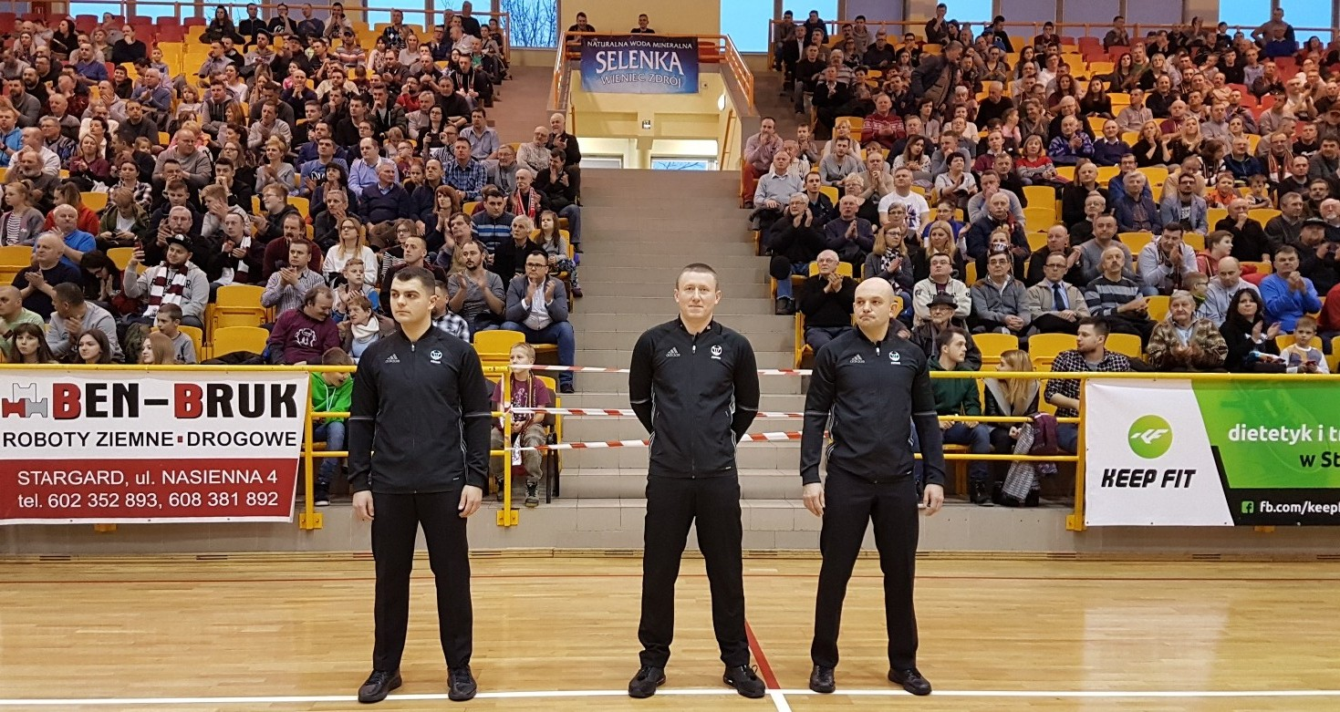 Sędziowie meczu Spójnia Stargard - Polfarmex Kutno